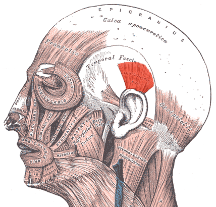 Auricularis superior muscle